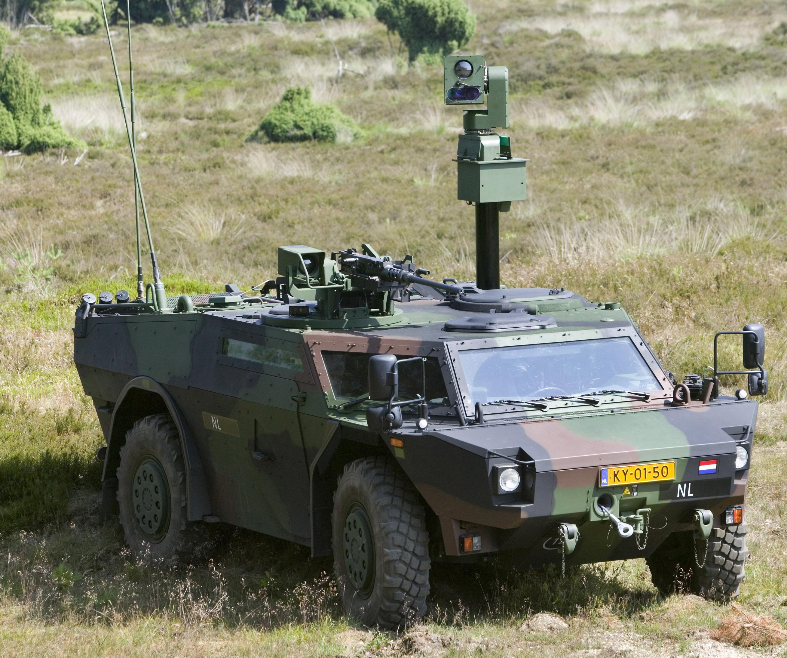 Een Fennek met een uitgeschoven waarnemingsunit, met daarin een laserafstandsmeter, �een CCD-camera en een warmtebeeldkijker.